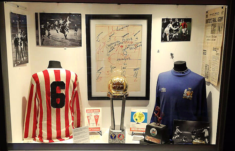 Vitrina con objetos históricos y el trofeo de la final de la Copa Intercontinental 1968, en el Museo del Club Estudiantes de La Plata, de Argentina.